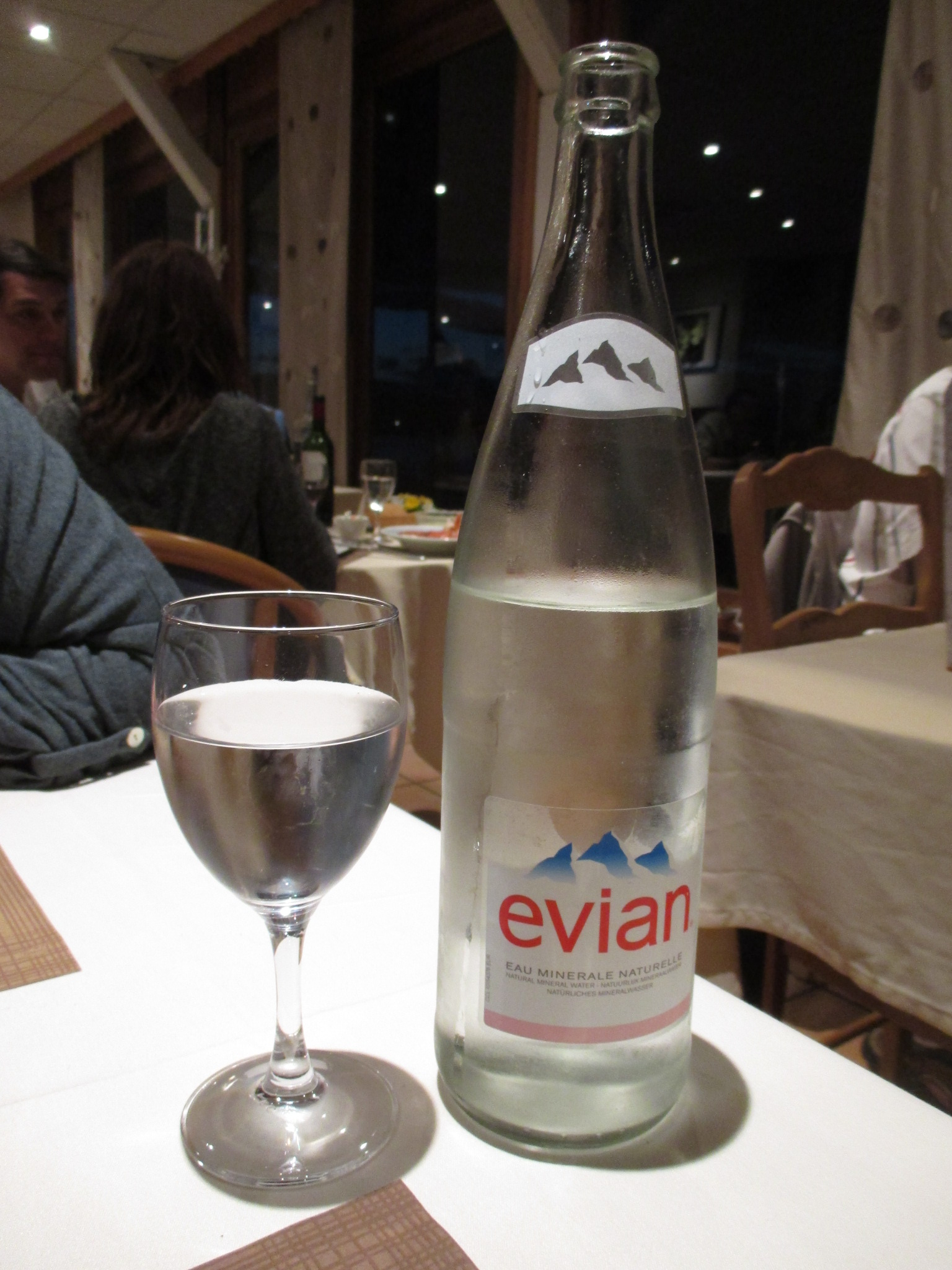 Evian